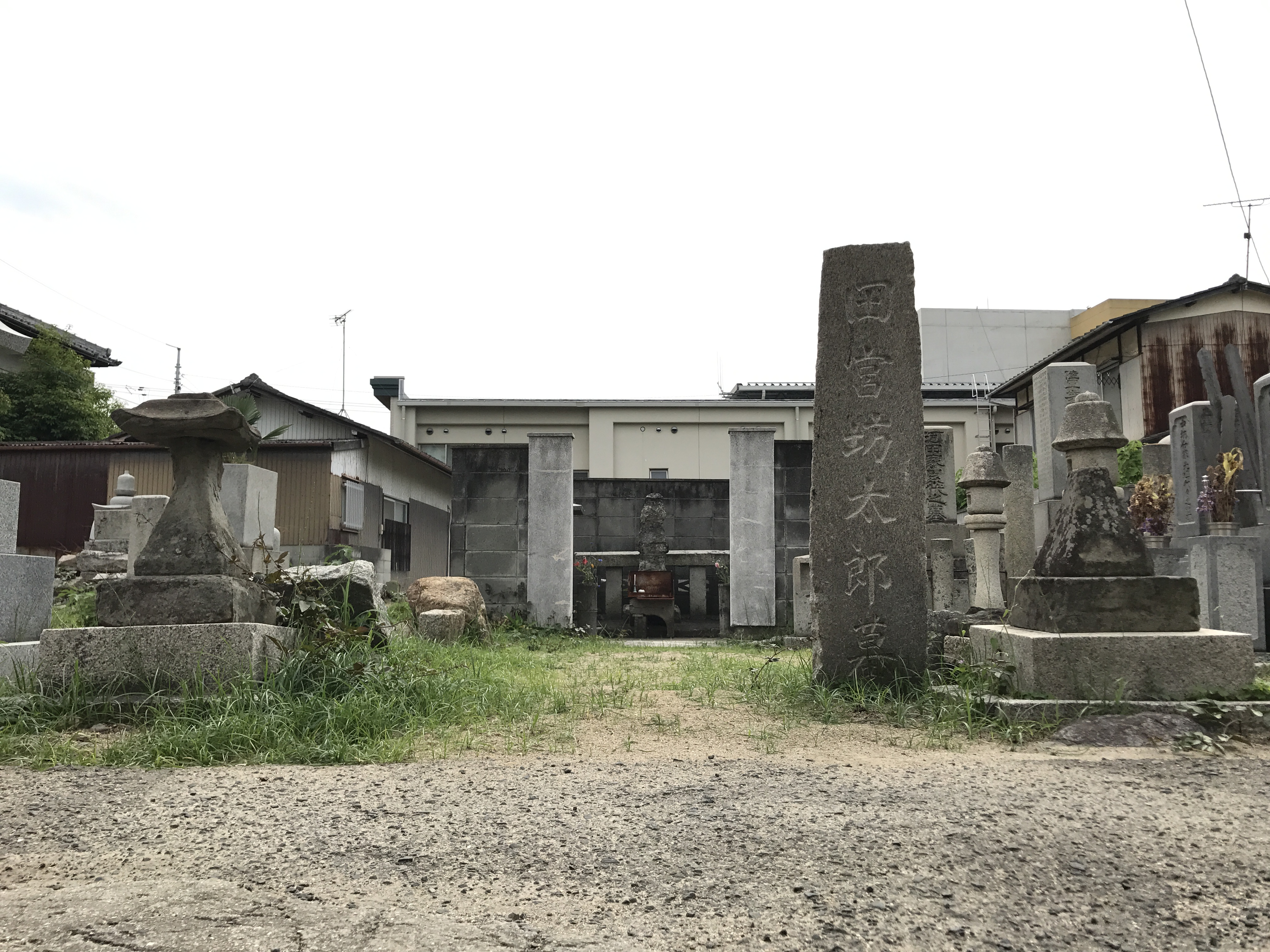 宮田坊太郎の墓